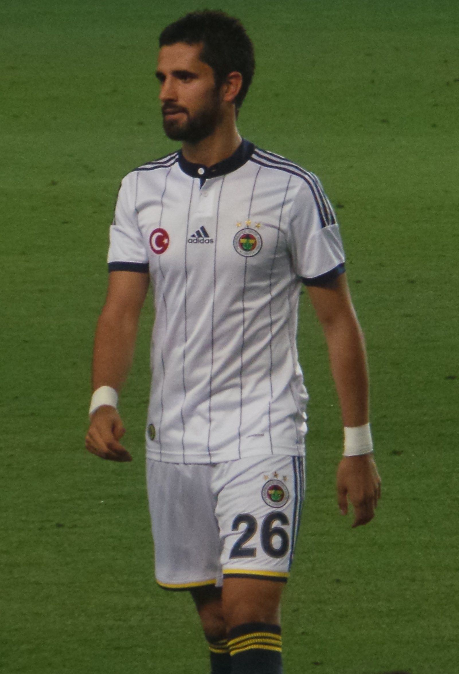 Alper Potuk'14